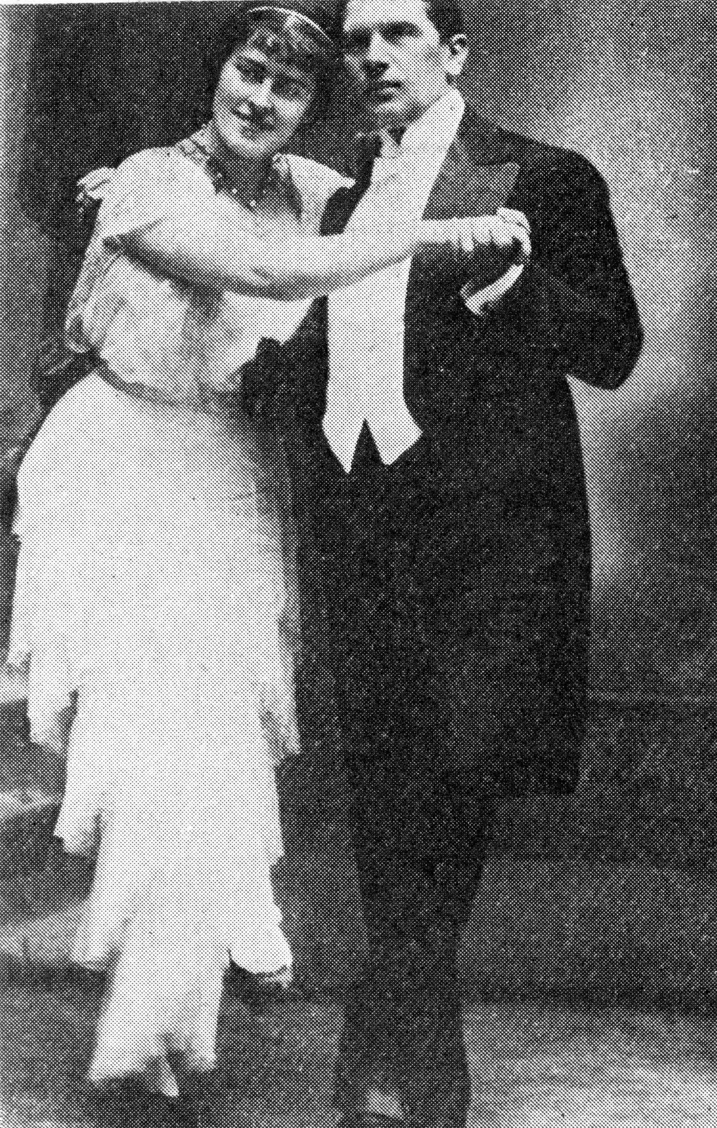 Lucyna Messal i Józef Redo w Targu na dziewczęta